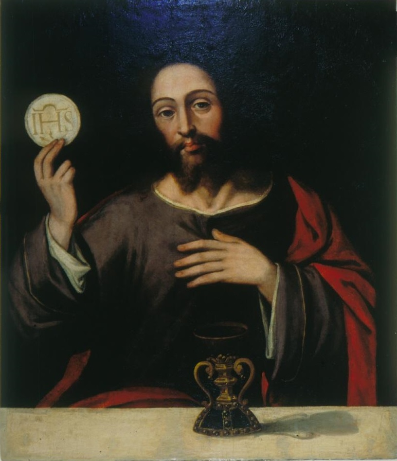 La obra representa a Jesucristo sosteniendo en su mano derecha la Sagrada Forma y con su mano izquierda apoyada sobre su corazón.